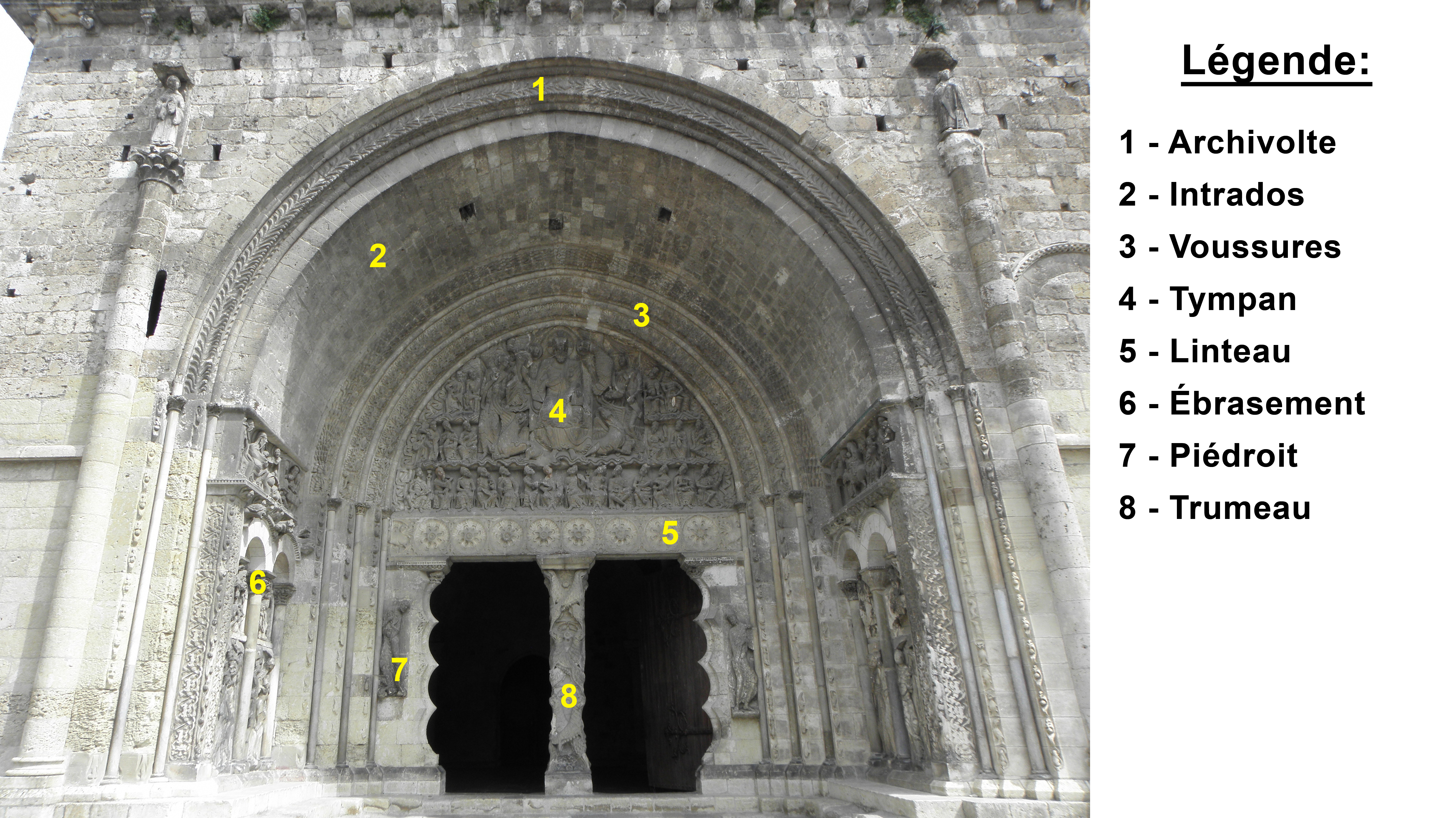 description portail roman